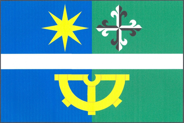 vlajka, Radkovy, okres Přerov